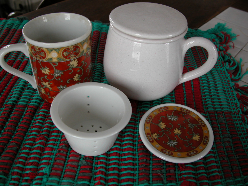 Foto mia personale, due tisaniere, 2008